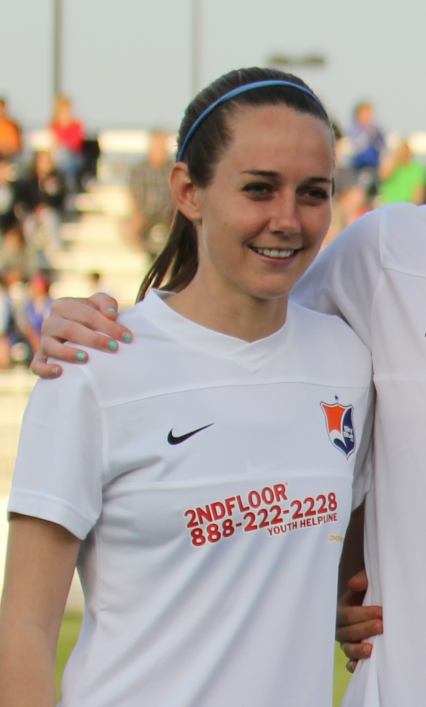 Katy Freels (Sky Blue FC)